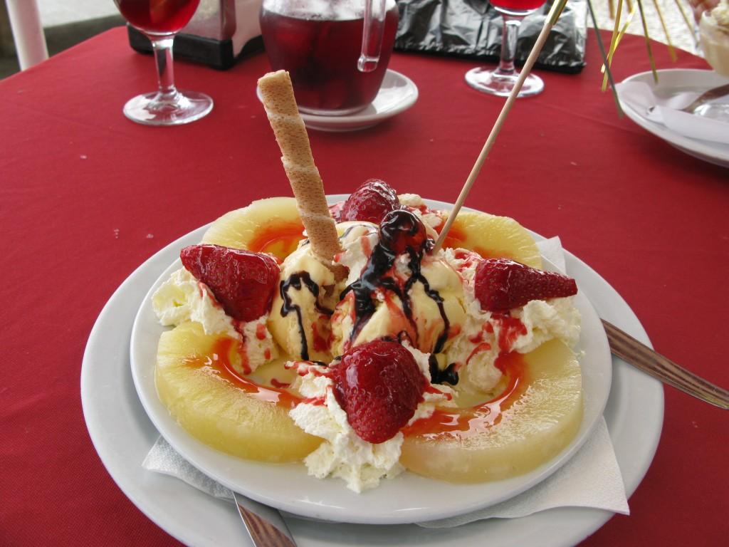 Funchal, Madeira, 2008.